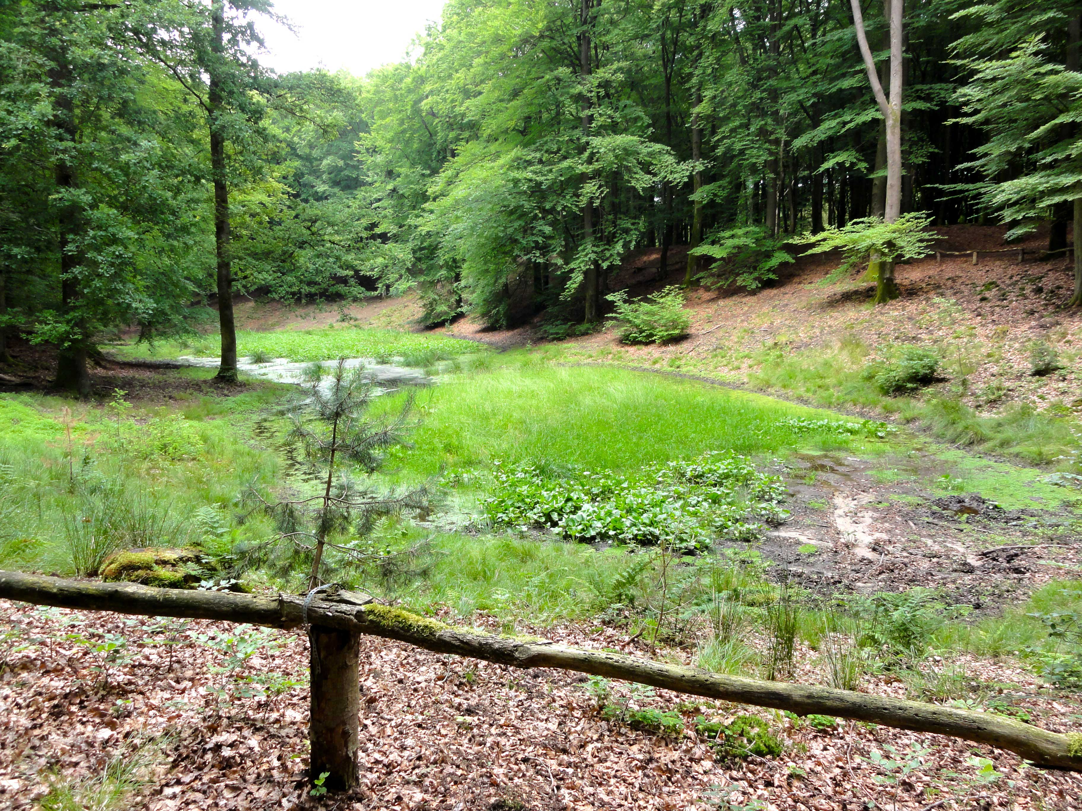 Het Solsche Gat